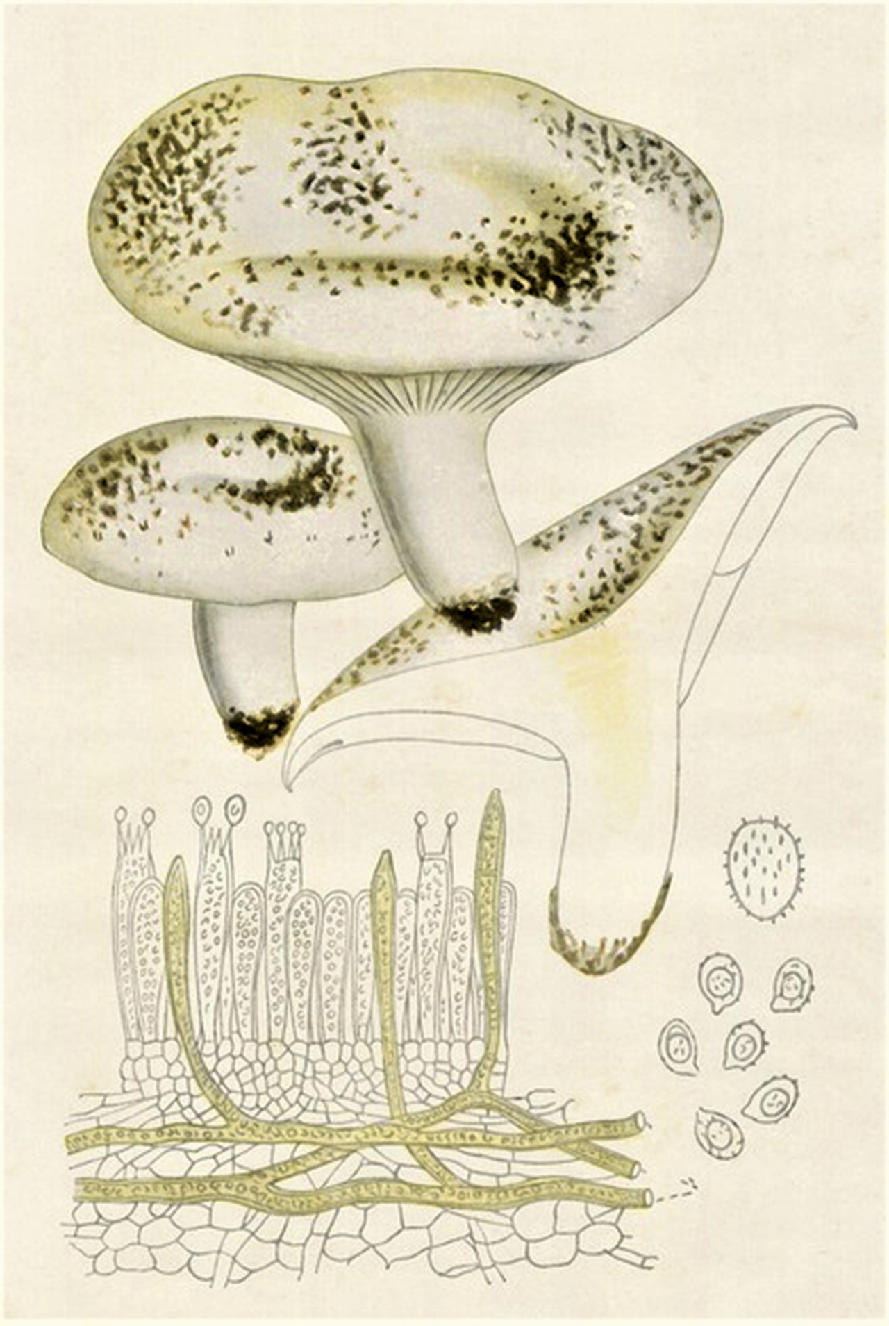 Giacomo Bresadola: Russula delica Fr. (1838)